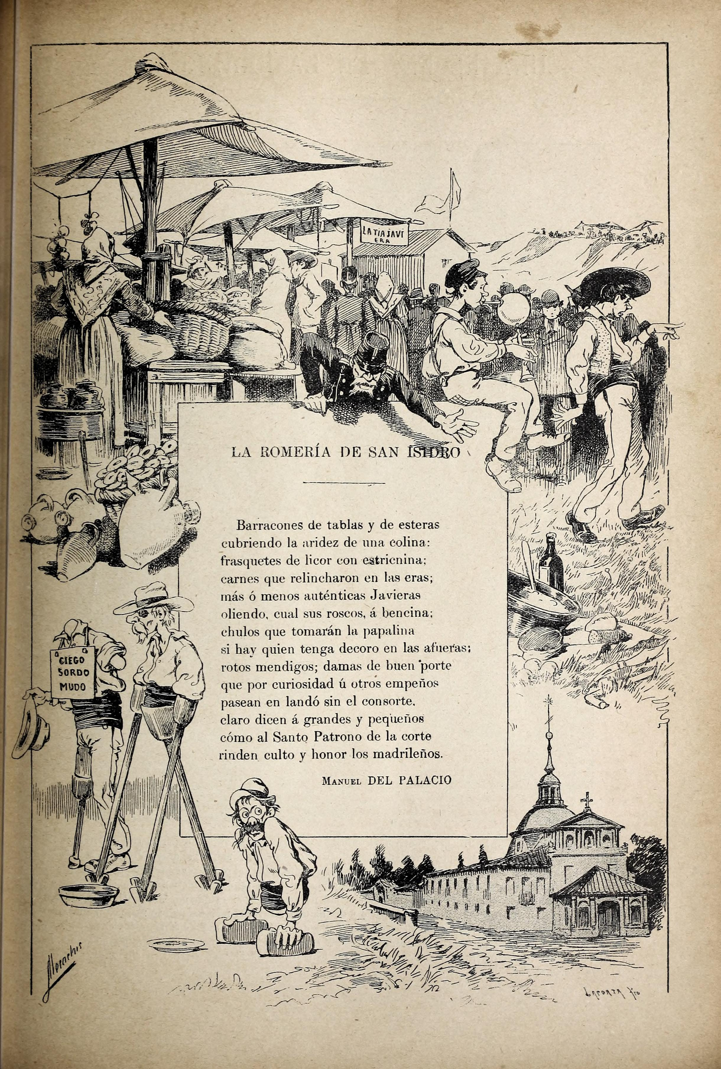 La romería de San Isidro.